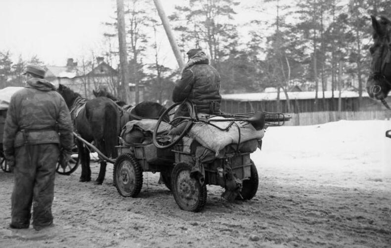 Scherl: Auf einer Verbindungsstraße zwischen Ilmensee und Finnischem Meerbusen Im Zuge der Frontverkürzung gehen Einheiten in planmäßiger Ordnung in die ihnen neu zugewiesenen Stellungen. Achtung! PK-Aufnahme Kriegsberichter Reimers 28.2.44 [Herausgabedatum] Zentralbild: II. Weltkrieg 1939-45 An der Front in der Sowjetunion. Ende Februar 1944. Bei der sowjetischen Offensive zur Befreiung des Leningrader Gebietes Januar-März 1944 räumen die deutschen Truppen das ganze Gebiet zwischen Ilmensee und Finnischem Meerbusen bis zum Peipus-See.